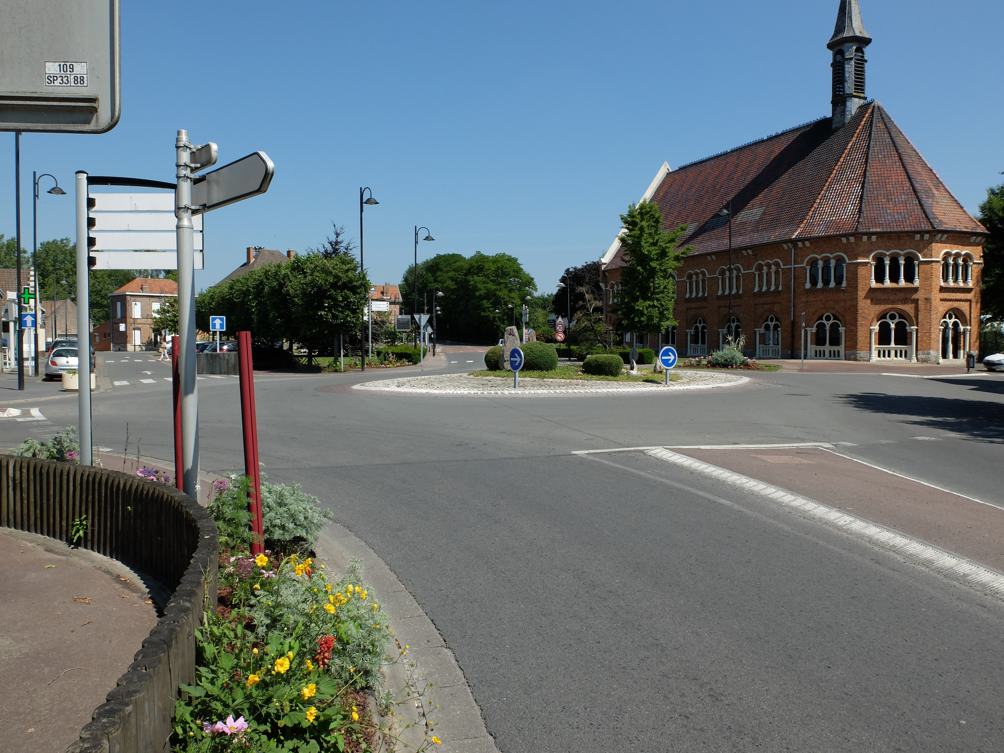 Vue du centre de Courchelettes.